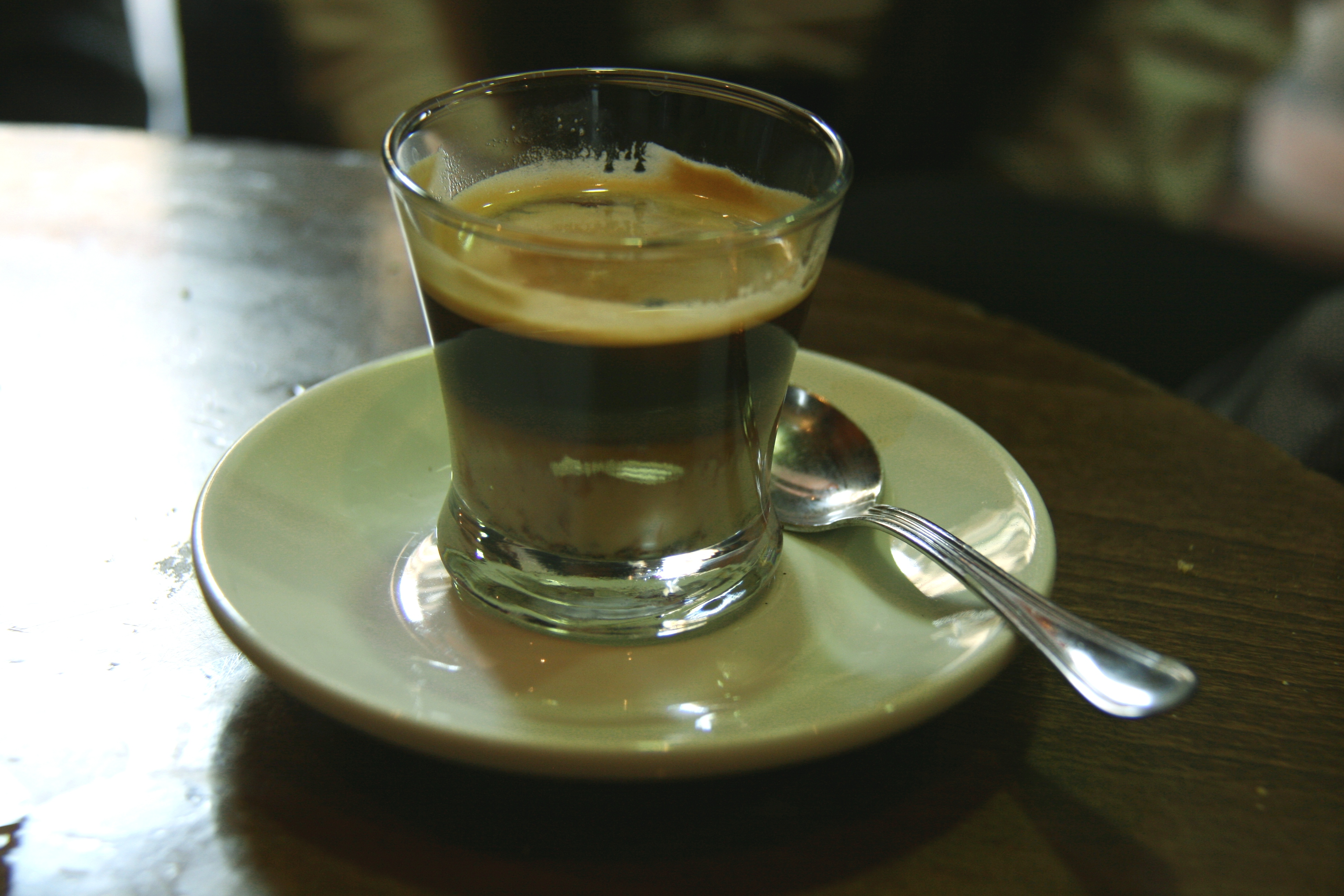 Café bombón con bayleys